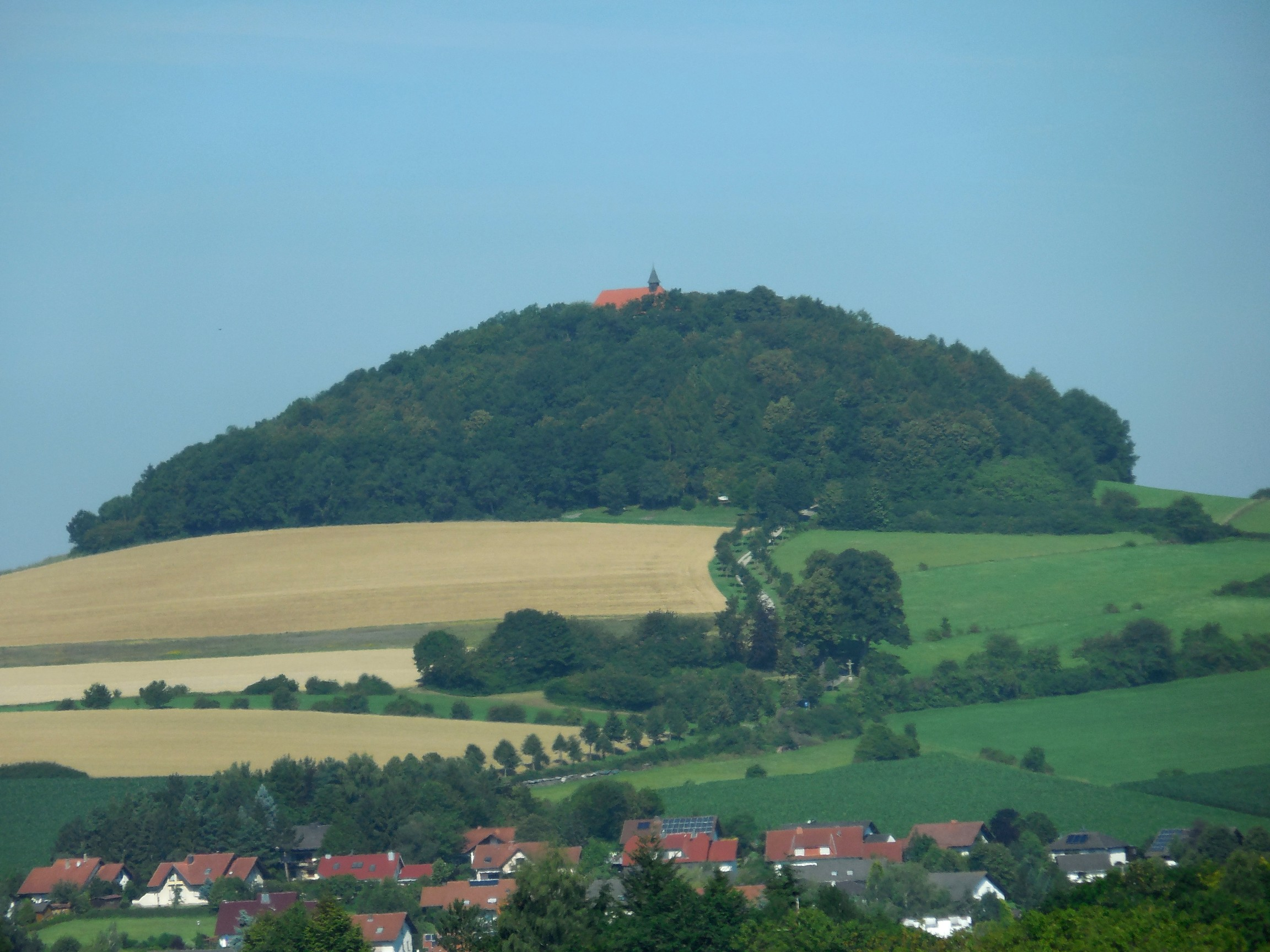 Gehilfersberg